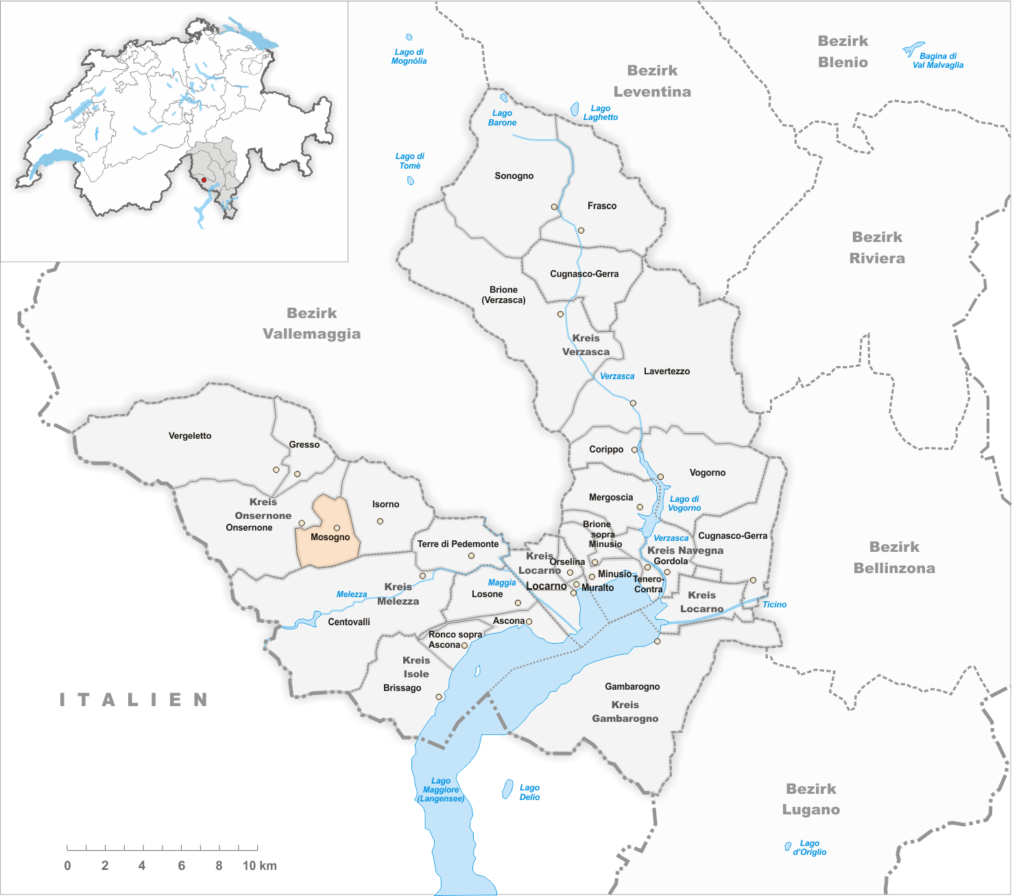 Municipality Mosogno